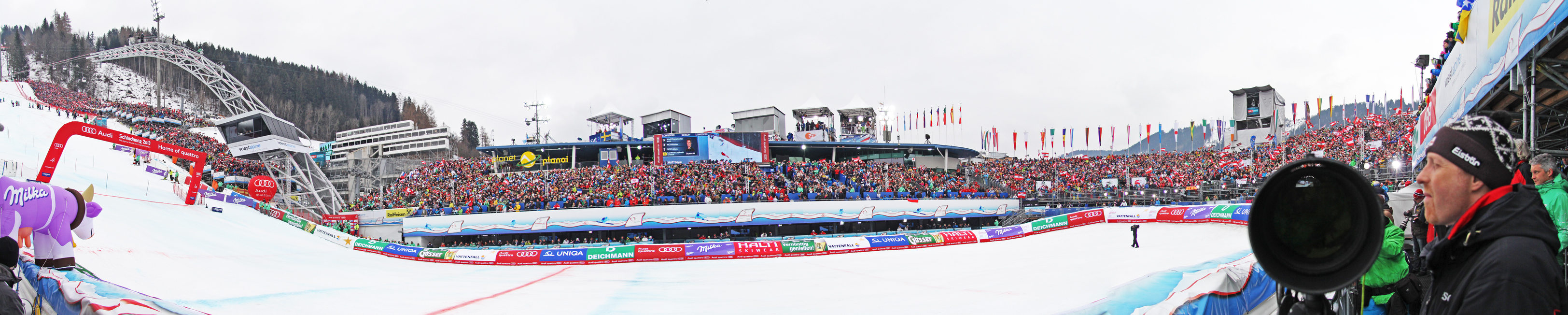 Von 4. Bis 17. Februar war die Planai der Nabel der internationalen Sportwelt: Schladming war Austragungsort der FIS Alpinen Ski-WM 2013